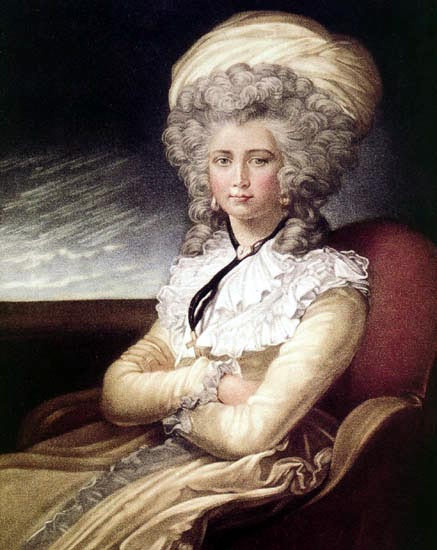 Self-portrait, 1787.